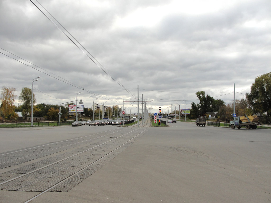 Перекрёсток улиц Вахитова и Большая Крыловка